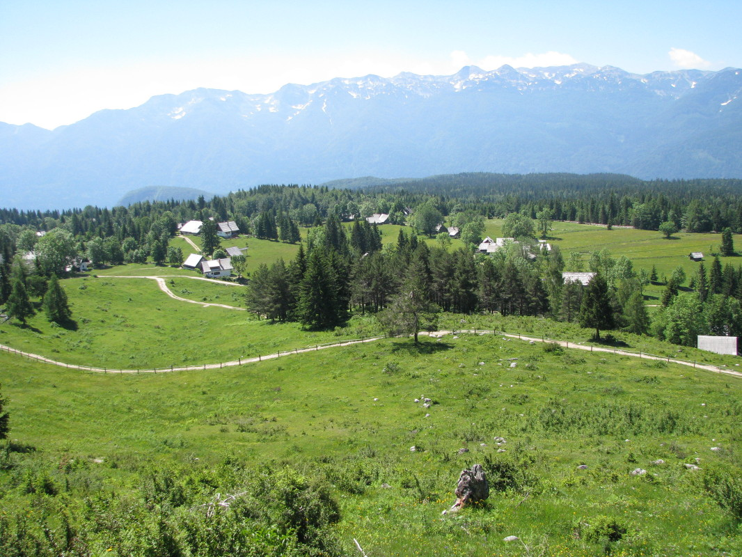 Planina Uskovnica, Slovenija.